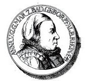 Anna von Veldenz - Markgräfin von Baden-Durlach; Regentin 1577-1584